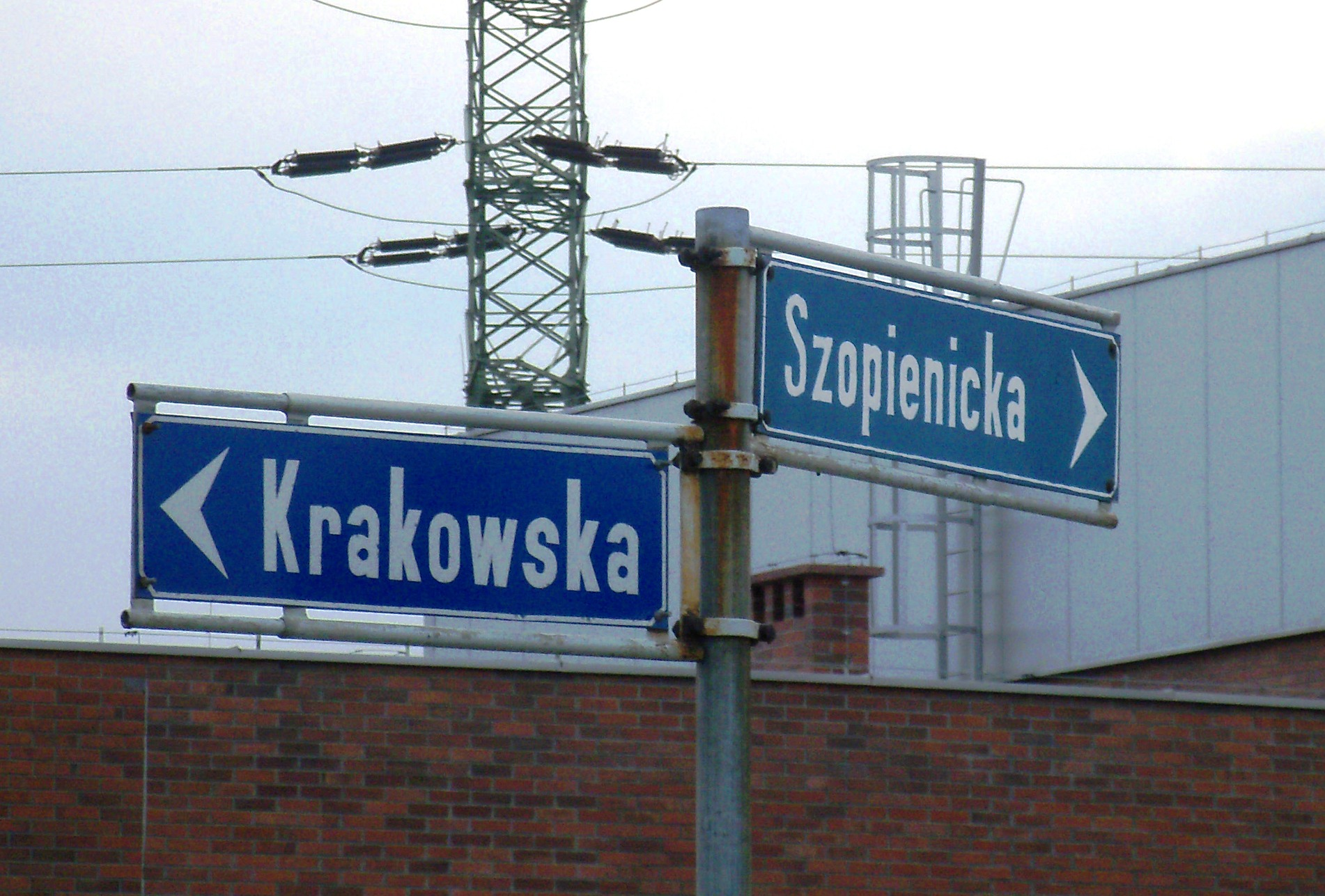 Znaczek/tabliczka przy skrzyżowaniu ulic Szopienickiej i Krakowskiej w Katowicach-Szopienicach